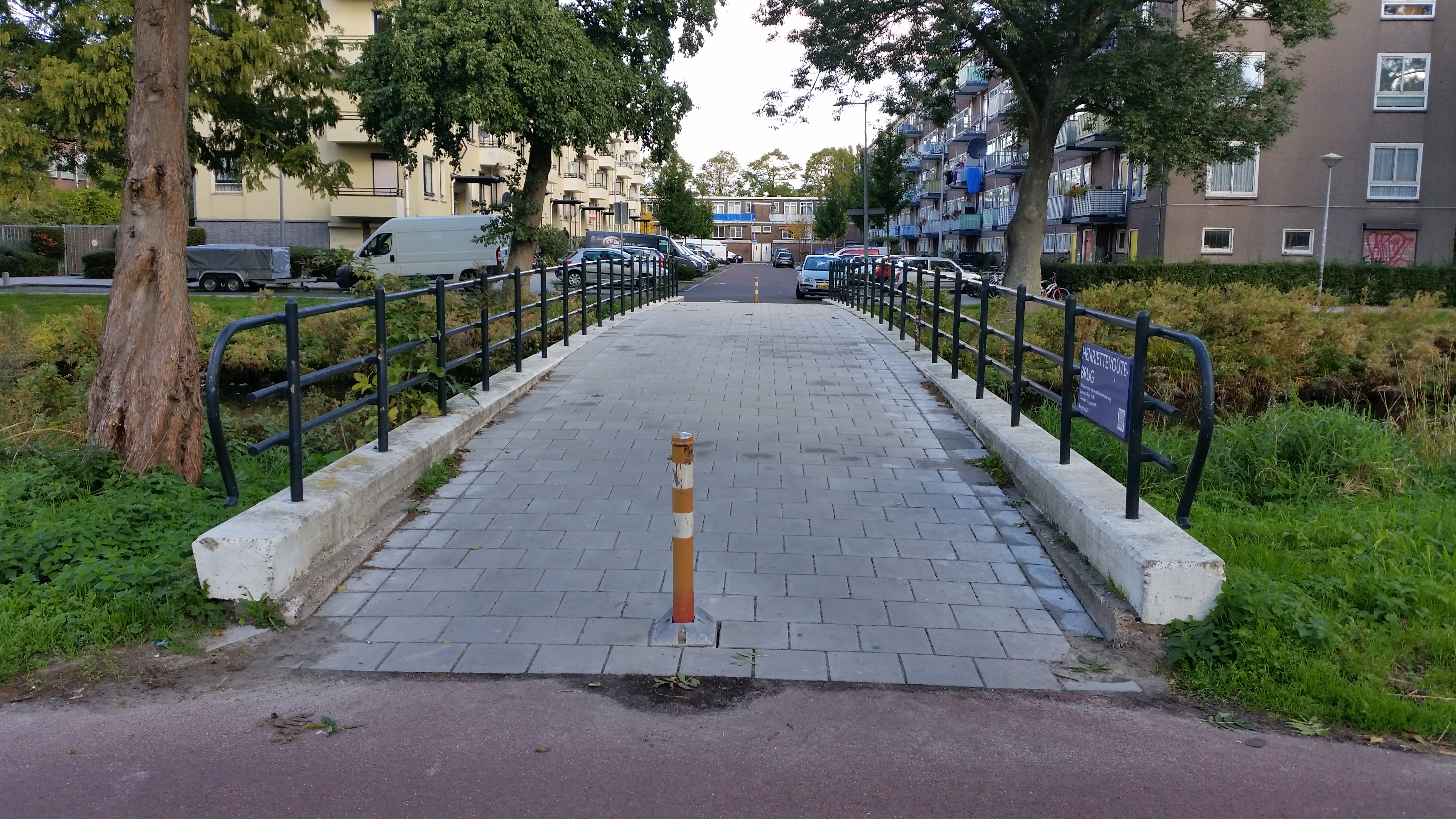 Overzicht van Brug 629, Henriette Voutebrug